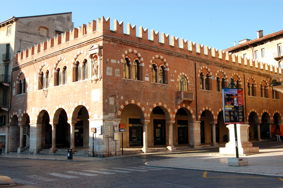 Fotografia della Domus Mercatorum a Verona